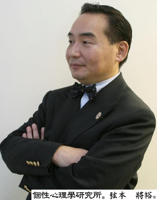 個性心理學研究所 弦本將裕所長